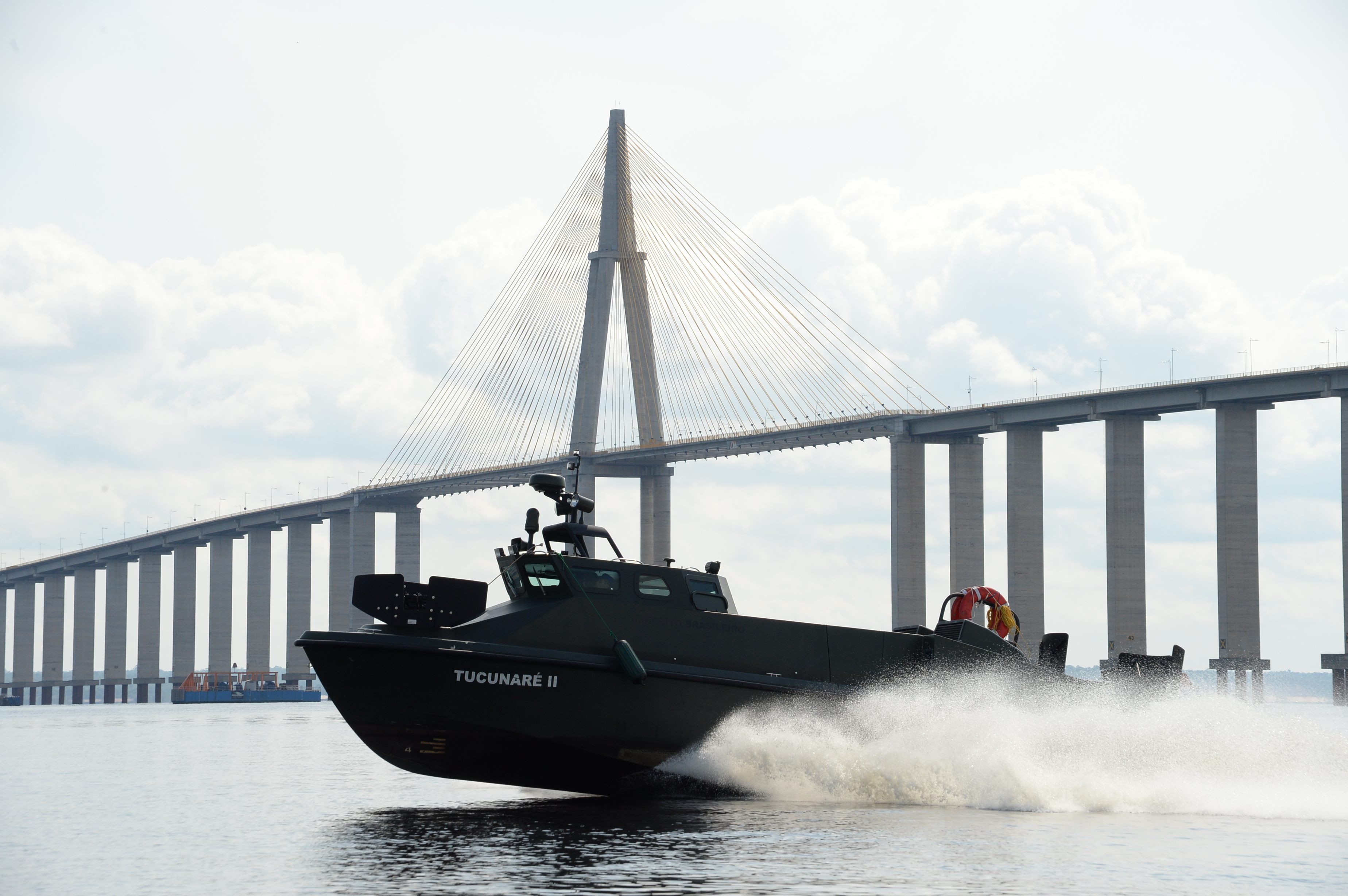 14/10/2014, Manaus - AM Fotos: Jorge Cardoso